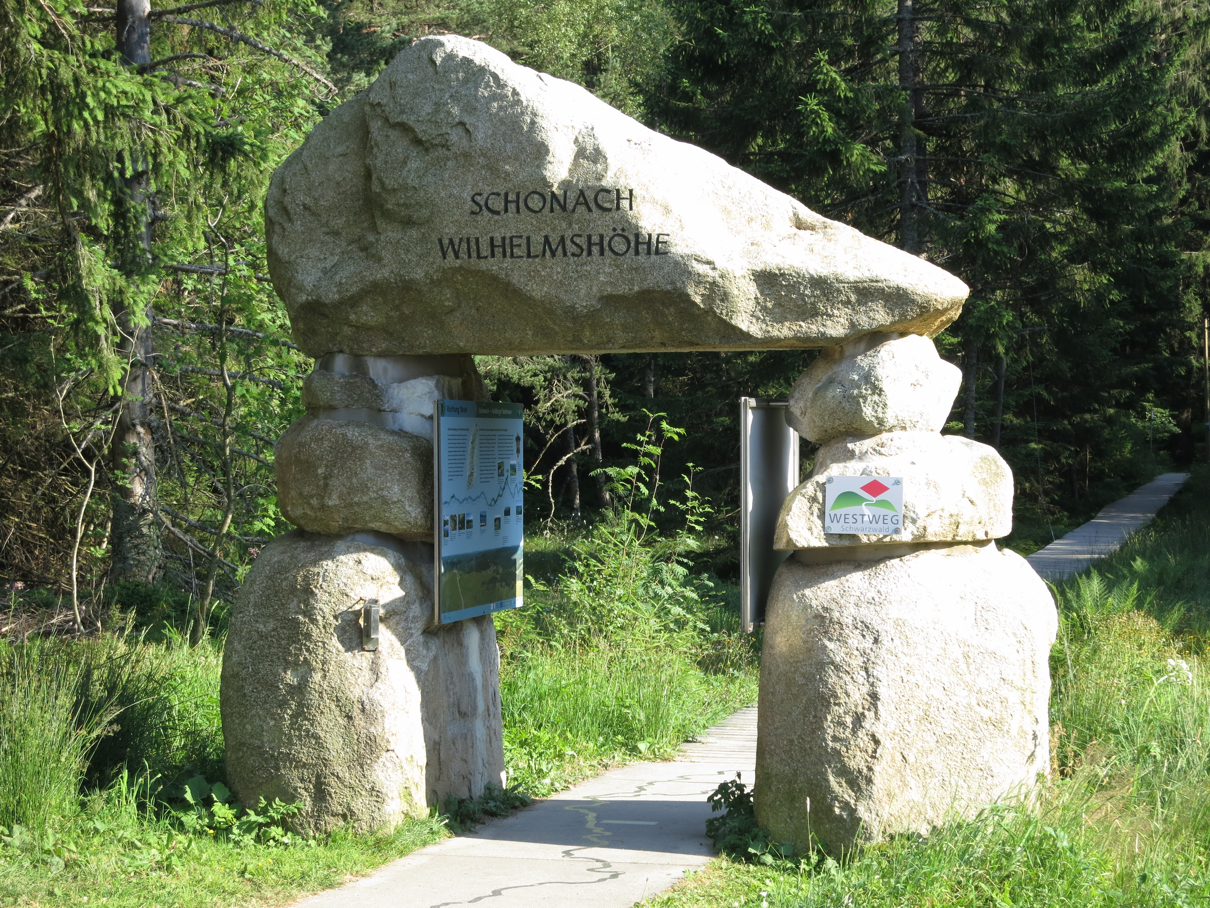 Westwegportal "Schonach Wilhelmshöhe"